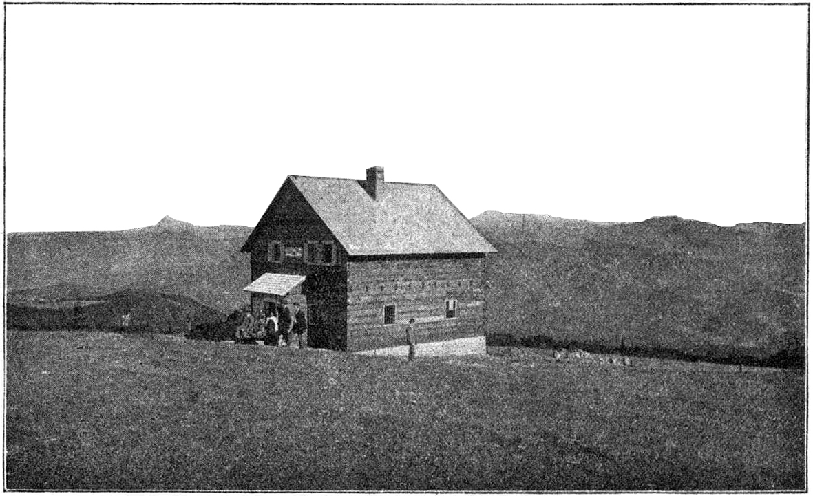 Niederösterreich, Kleinzell, Schutzhaus auf der Reisalpe (erbaut 1898)